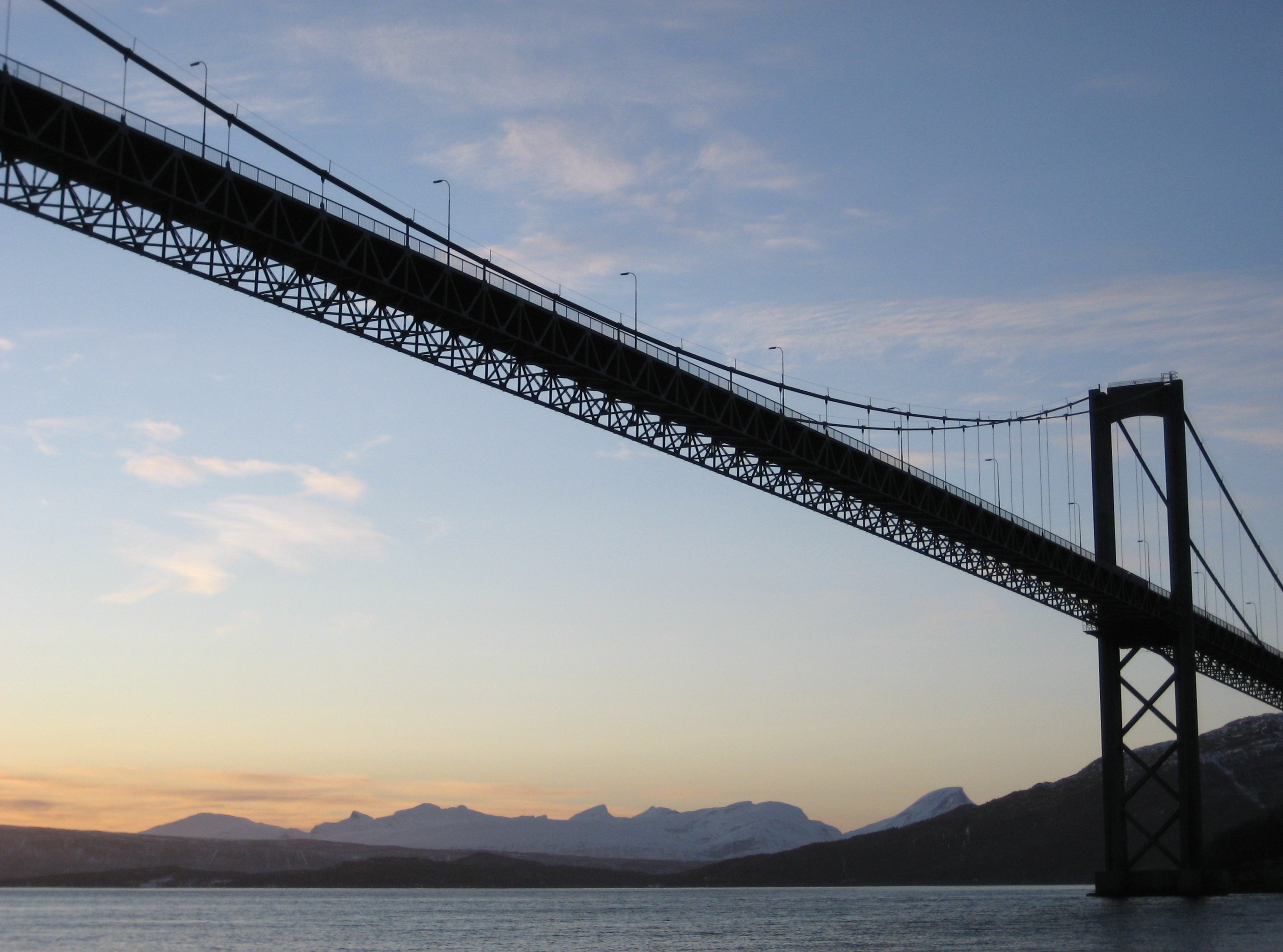 Silta